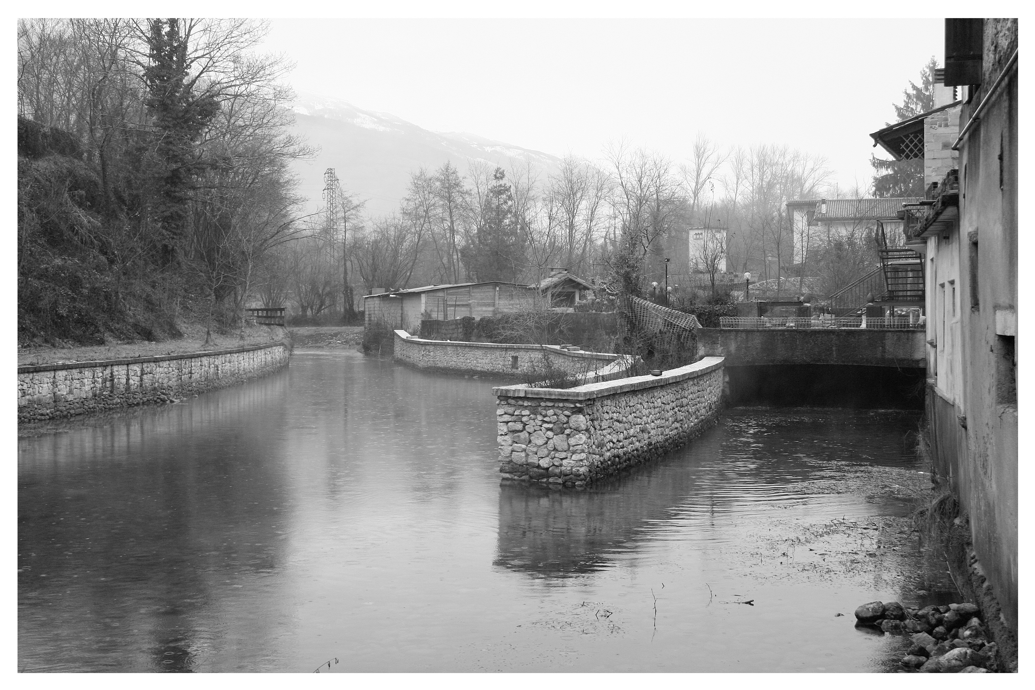 Polcenigo, Friulio Venezia Giulia, Italia